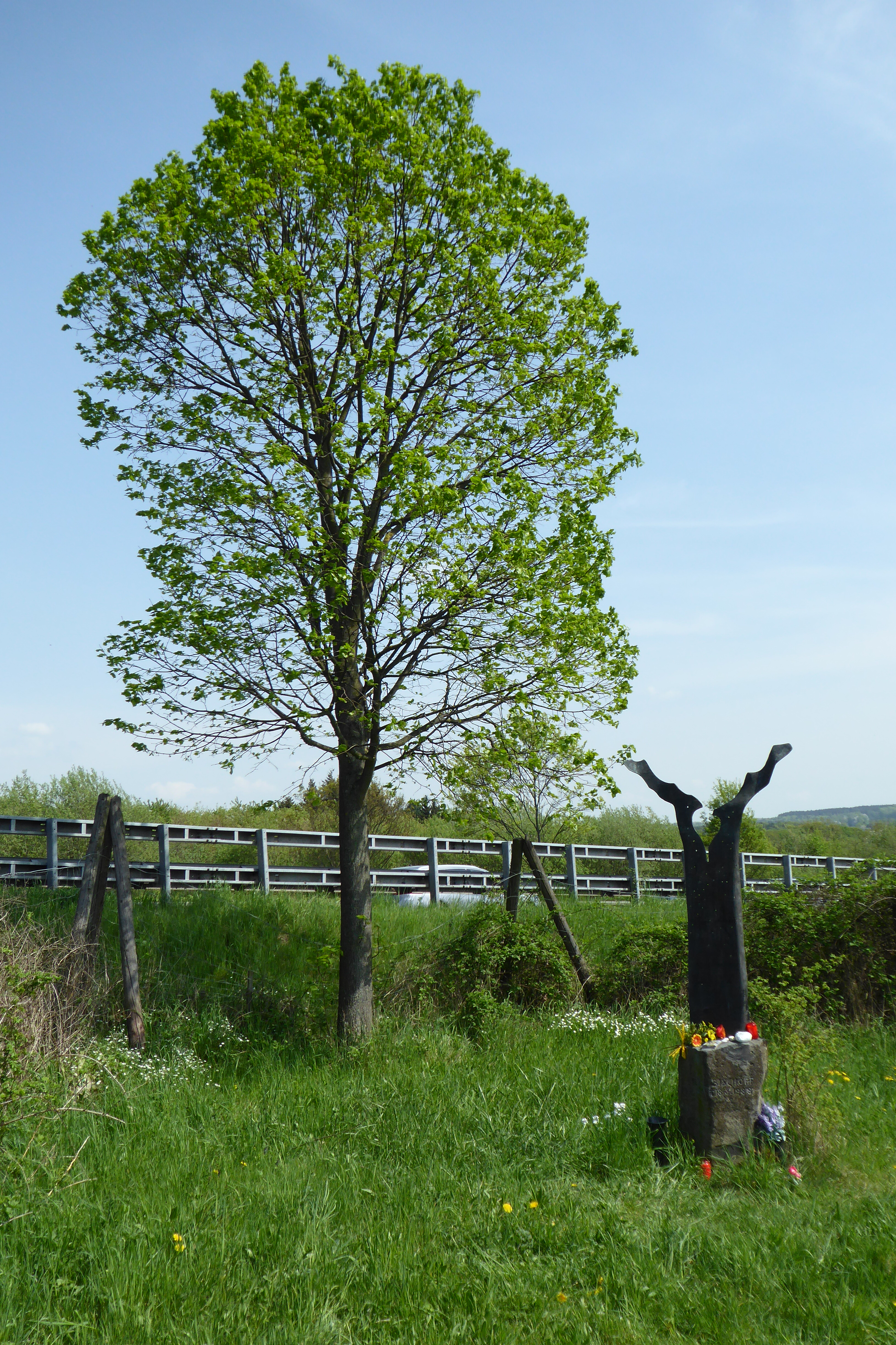 Gedenkstätte für Silke Bischoff: Neben der vom Landesbetrieb Straßenbau in Bonn gepflanzten Linde wurde im August 2009, 21 Jahre nach der Tat, eine von dem Bildhauer Franz Hämmerle aus Windach gestaltete Stele aufgestellt. Die Skulptur aus Stahl hat 62 Einschusslöcher, genauso viele, wie der Fluchtwagen der Geiselnehmer nach dem Zugriff des Kölner SEK am 18. August 1988 hatte.